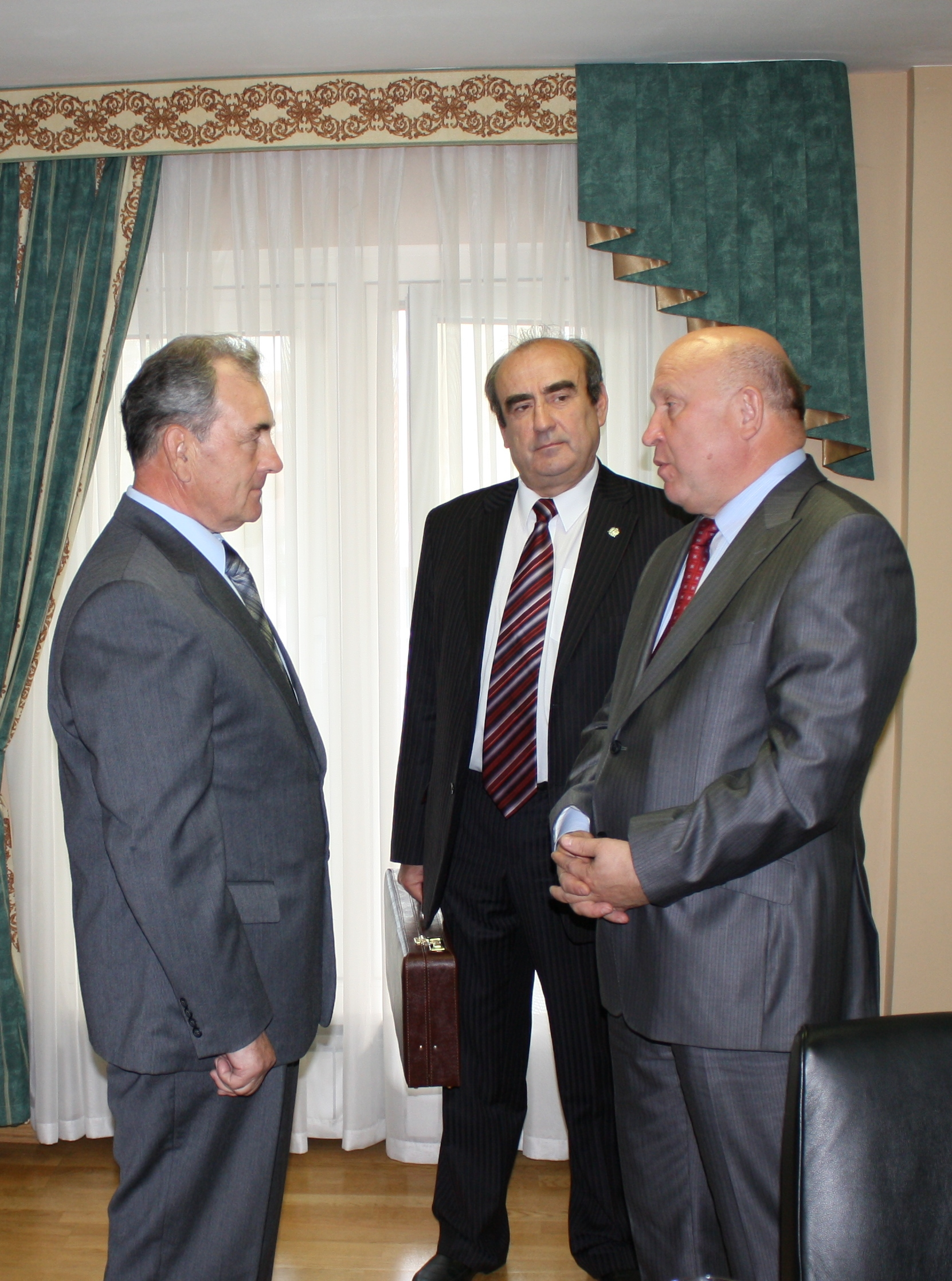 2009-09-15 Валерий Шанцев, Сергей Потапов и Виктор Карпочев